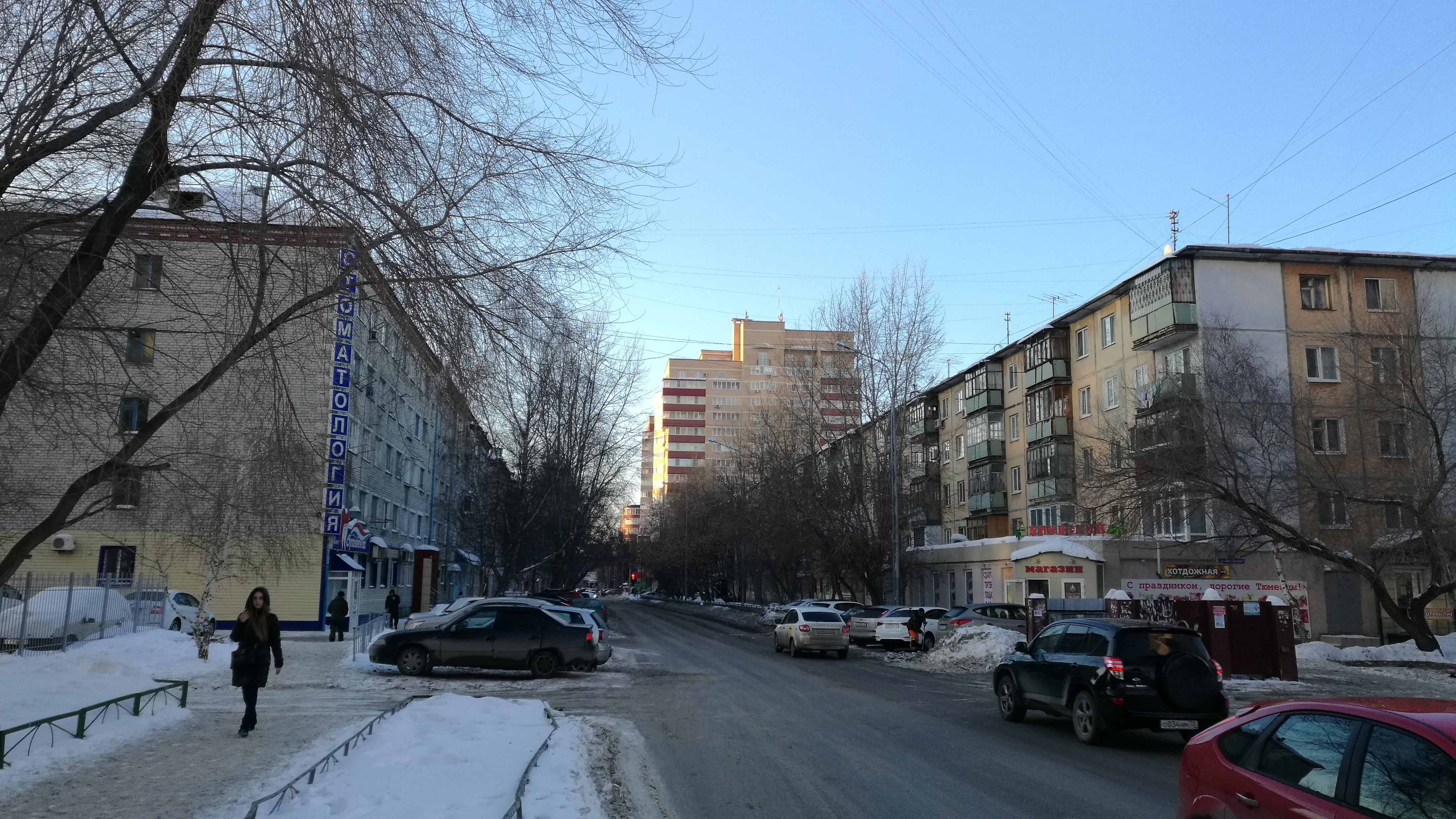 Strato Fabriĉnaja. Tjumeno, Rusio.